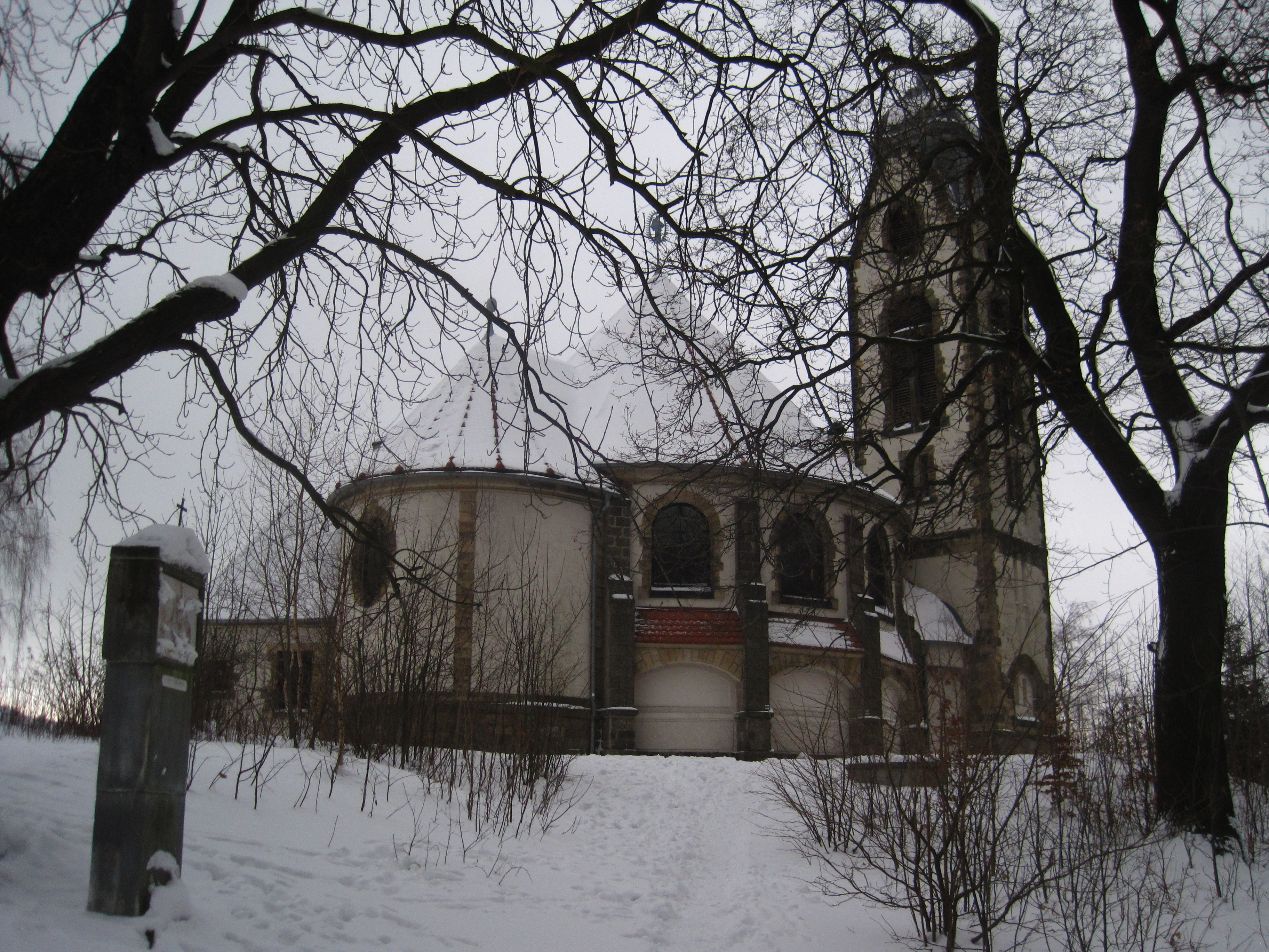 Poutní kostel Panny Marie U obrázku, Ruprechtice, Liberec.